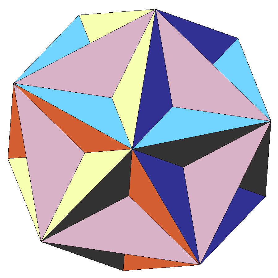 Вторая звёздчатая форма додекаэдра.